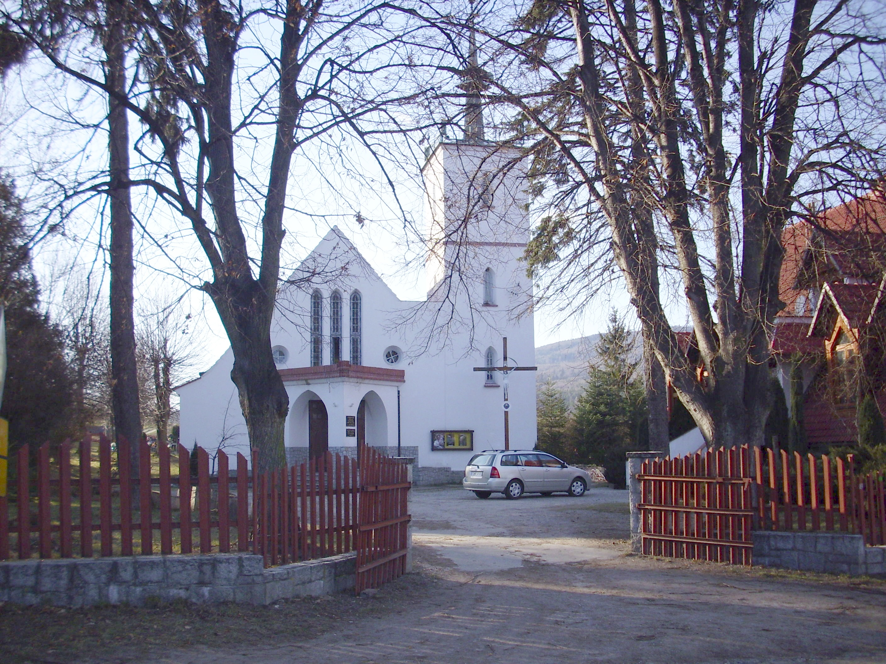 Kościół pw. Najświętszego Serca Pana Jezusa w Sulistrowicach (zabytek nr rejestr. A/5081)